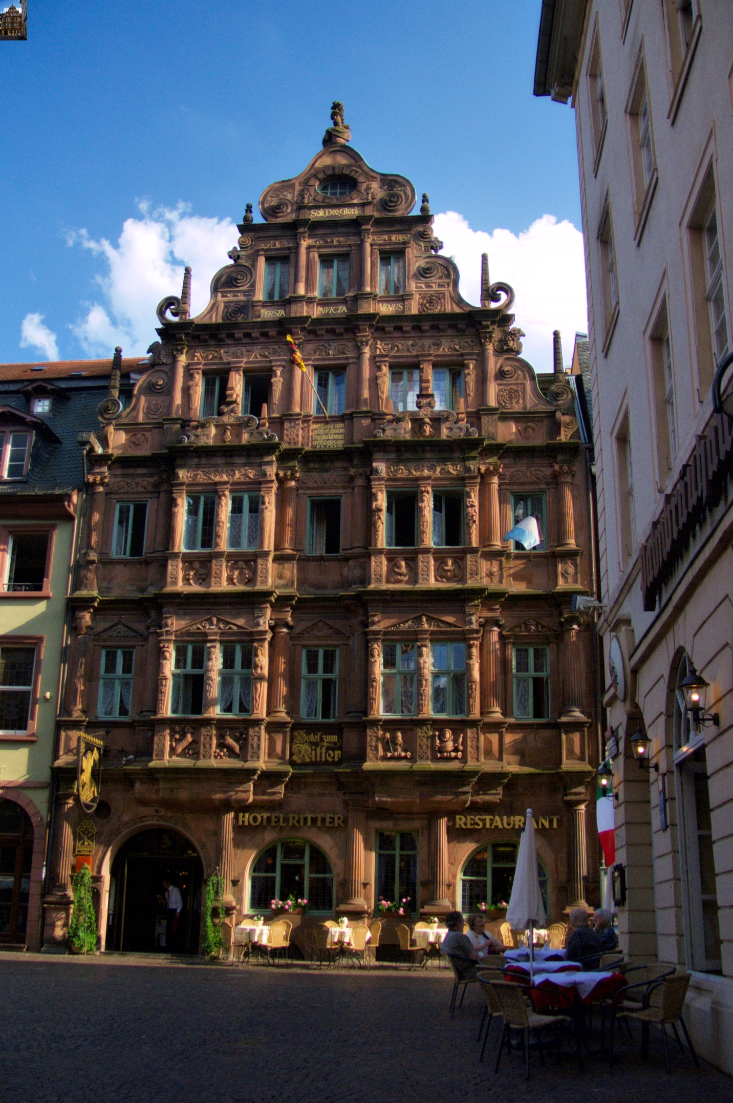 The Hotel Ritter in Heidelberg